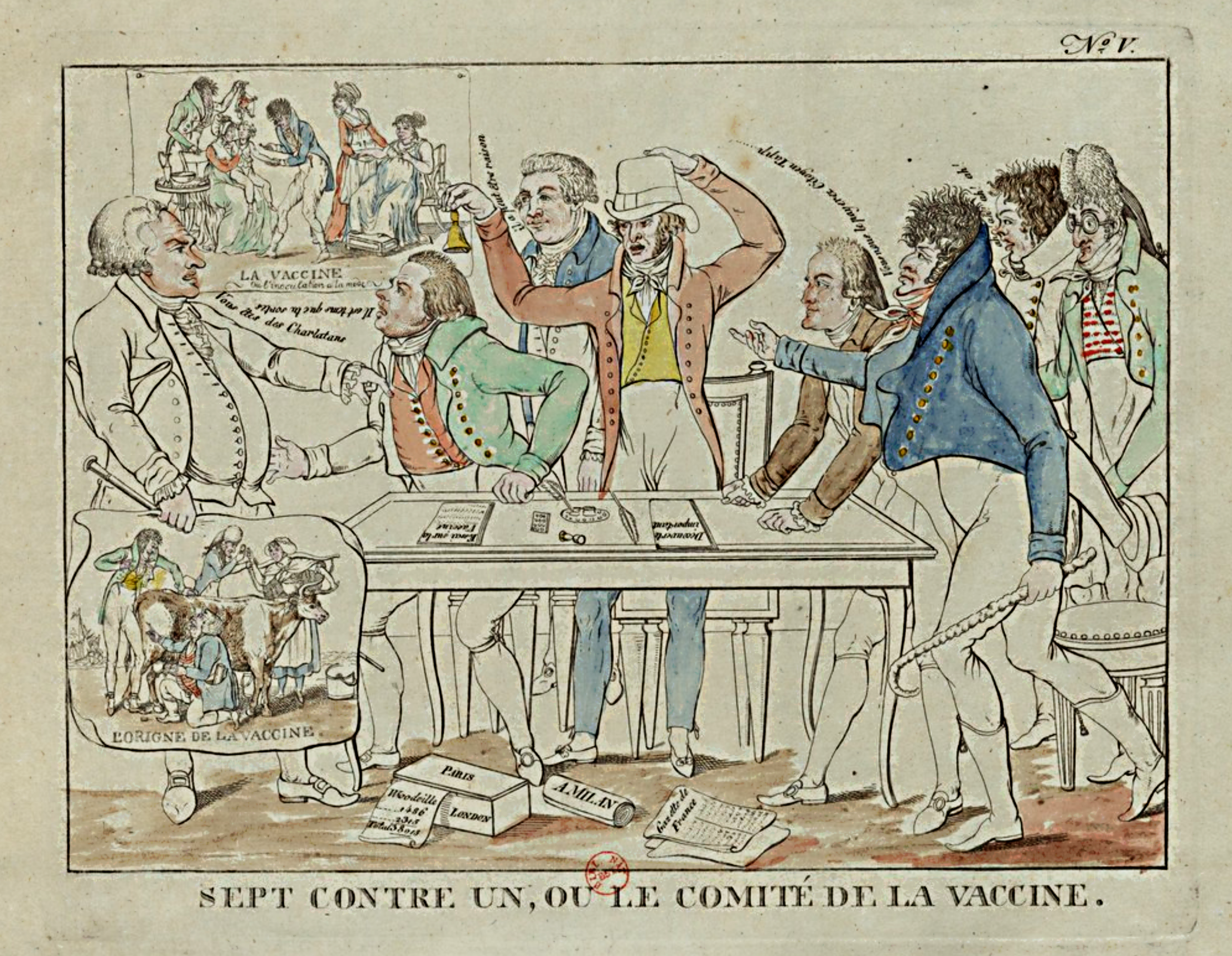 "On y voit le «citoyen Tapp» (c'est ainsi que l'appelle l'un des personnages) traitant de «charlatans» les membres du comité de la vaccine, qui protestent. On remarque à terre la boîte dans laquelle fut envoyé de Londres à Paris le fluide qui servit à William Woodwille, chef de l'hôpital des inoculés de Londres, dans la séance de vaccination du 2 juin 1800 (voir la note en tête du présent chapitre). Sur le bureau se trouve un Essai sur la vaccine, qui est vraisemblablement l'Essai sur l'inoculation de la vaccine, publié en l'an IX par François Colon, l'un des plus ardents propagateurs de la vaccination". -(FR-BnF 41514893p)